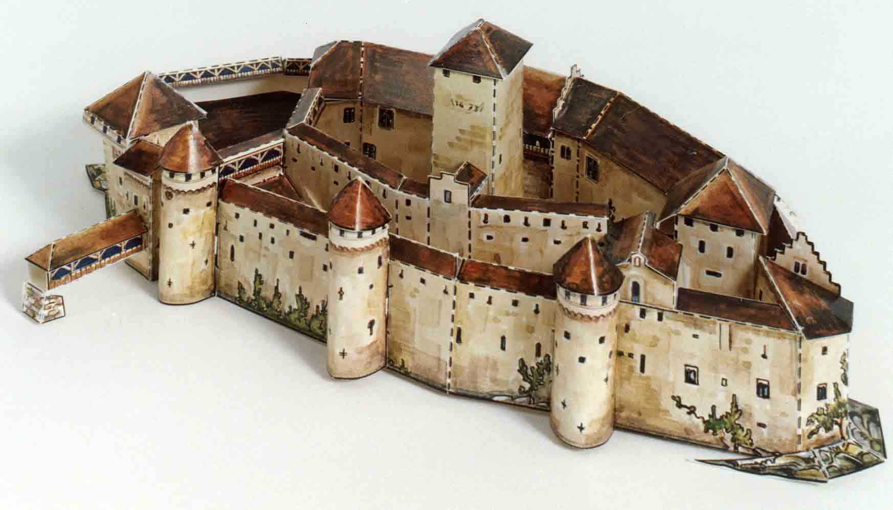 Kartonmodell des Schloss Chillon, ein Modell des Verlages Pädagogischer Verlag des Lehrerinnen- und Lehrervereins Zürich von Heinrich Pfenninger